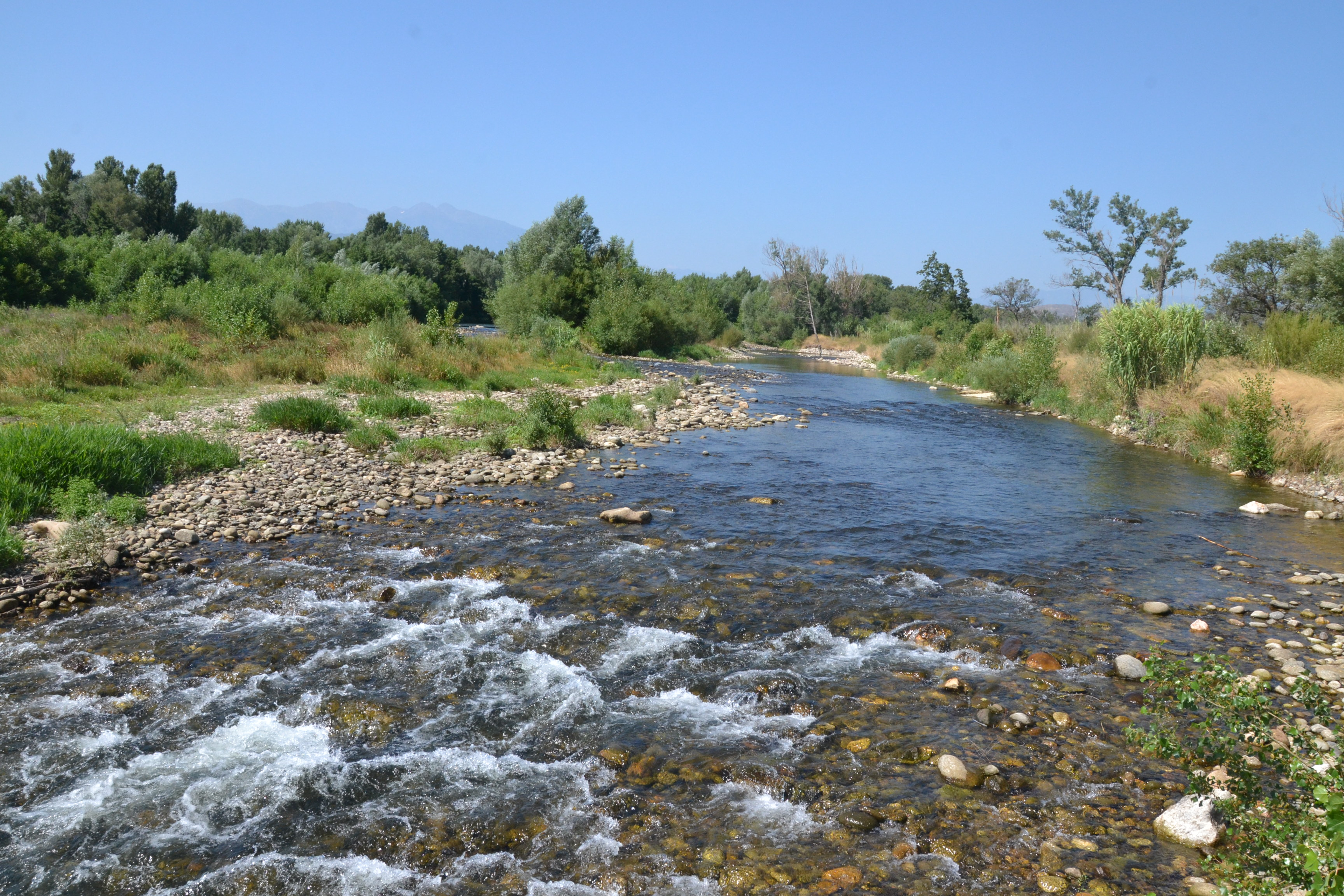 Passage à gué sur la Têt à Néfiach (Pyrénées-Orientales, France).